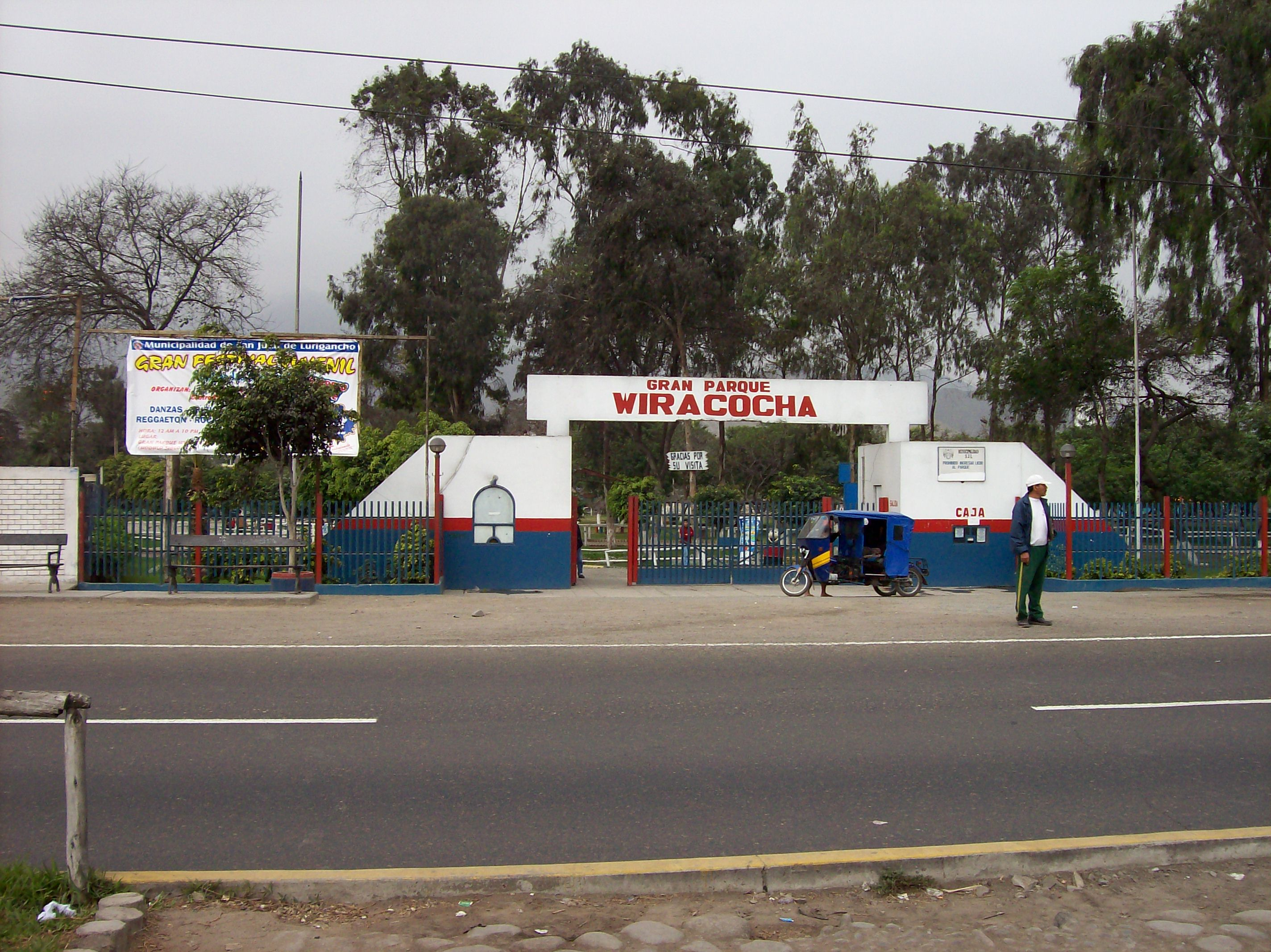 Fachada del Parque Zonal Wiracocha, San Juan de Lurigancho, Lima, Perú